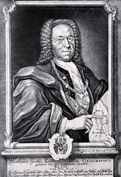 Georg Mattheus Seutter